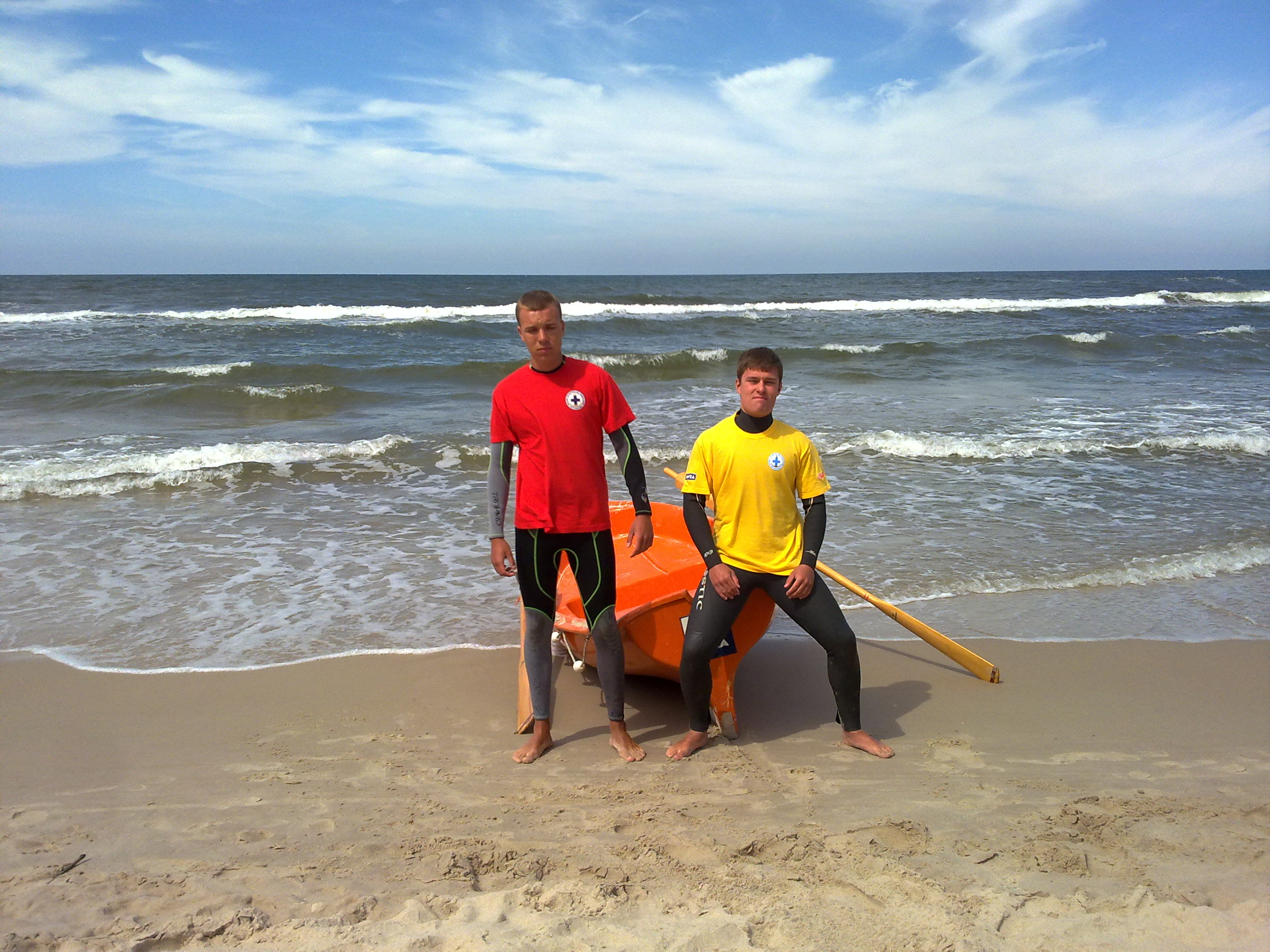 Plaża w Ustce. Stanowisko "Perła"